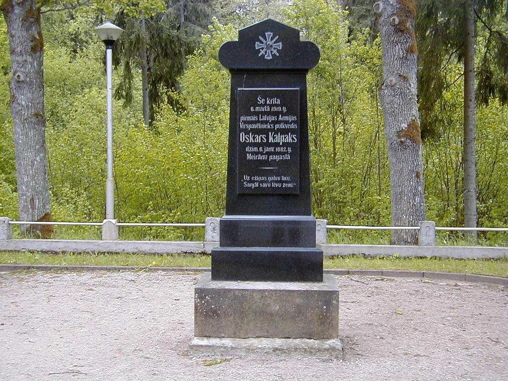 Airītes, O. Kalpaka piemineklis 2000-05-13. Arhitekts Artūrs Galindoms. Artūrs Galindoms, arhitekts, pulkvedis, Atsevišķas (Studentu) rotas kareivis.